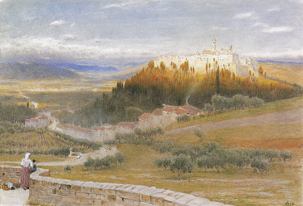 Certosa